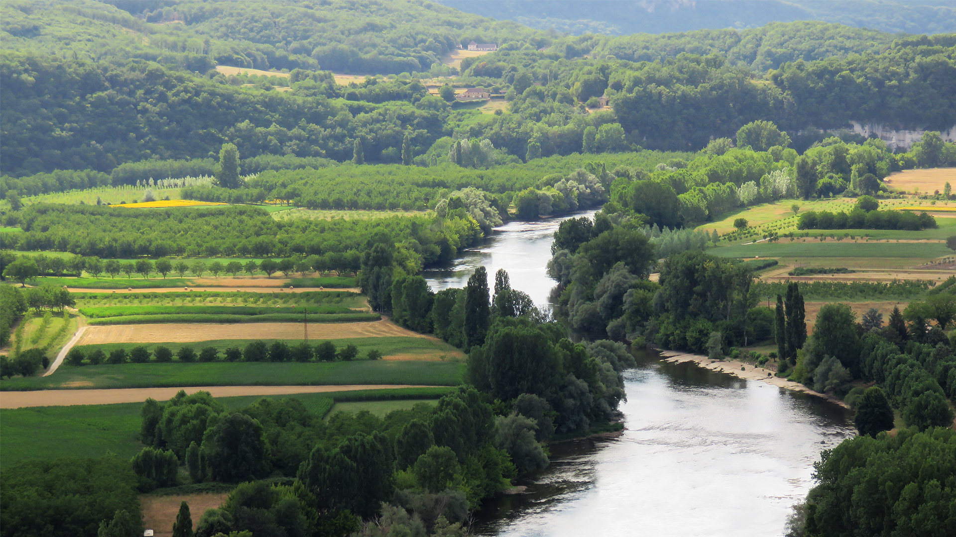 Photo prise de Saint-Cyprien en Dordogne